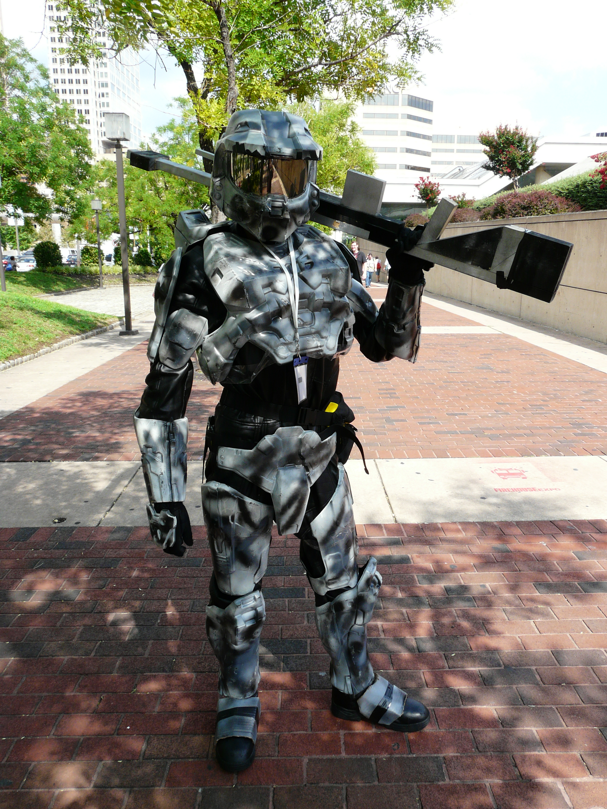 Otakon 2012 cosplay